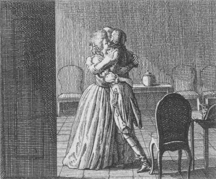 Titelvignette zu Goethe's Stella. Zur Schlussscene. Cäcilie führt Stella dem Fernando wieder zu. (Beschreibung lt. Quelle)